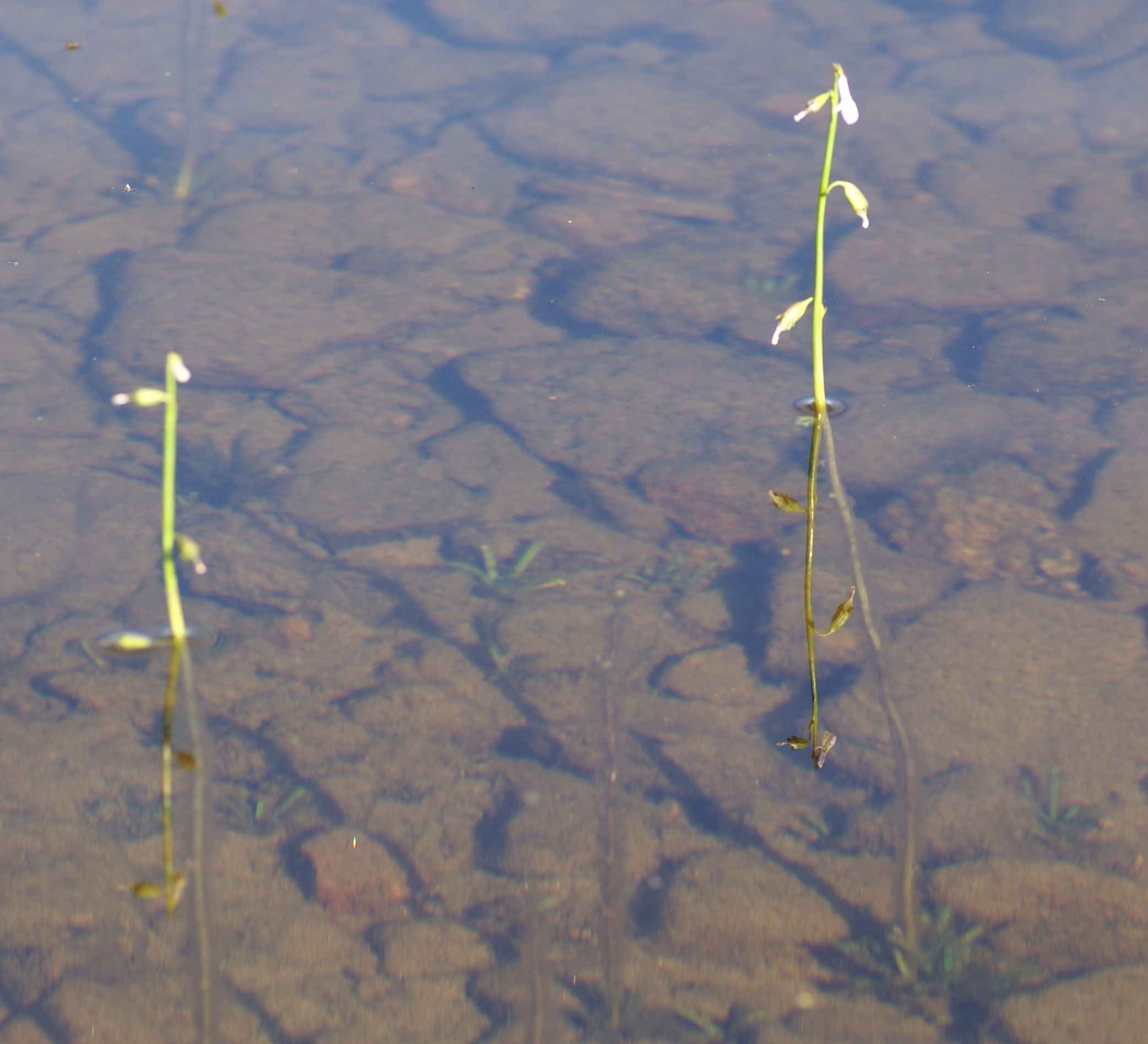 Plant species Lobelia dortmanna